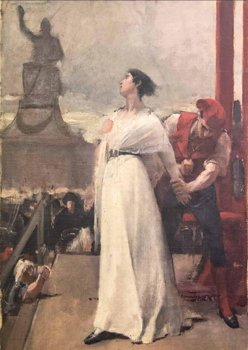 Manon Roland, à l'échafaud, se tourne vers une statue représentant la liberté et prononce la fameuse formule (vraisemblablement apocryphe) : « Ô Liberté, que de crimes on commet en ton nom ! ». Huile sur toile, école française, fin du XIXe siècle, musée Lambinet.